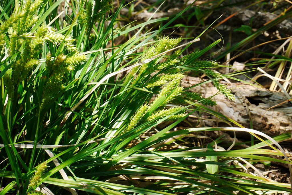 Carex metallica：フサスゲ 2013/05/05 和歌山県那智勝浦町：Nachikatuura Town, Wakayama Pref. Japan